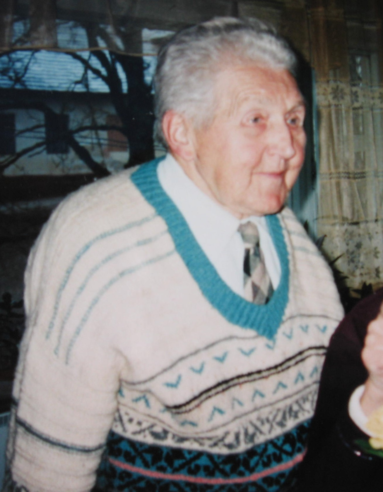 Elmar Arula Vinnis 1997. aastal